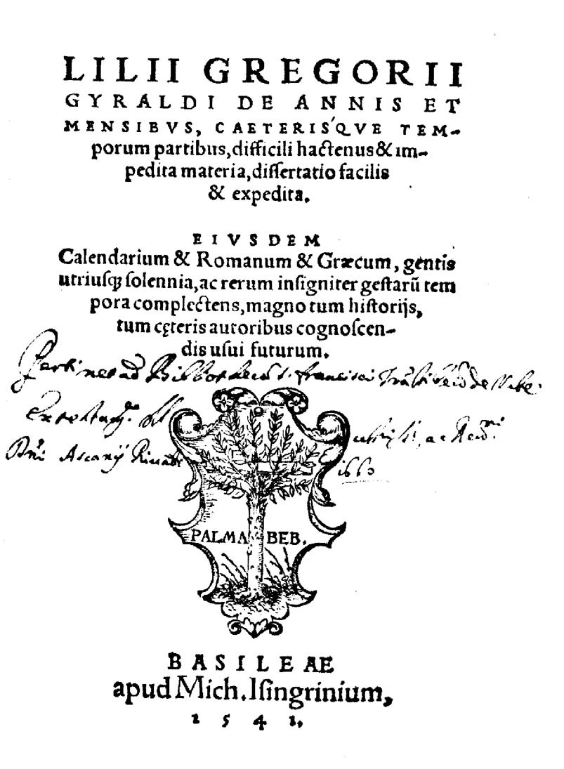 Lilii Gregorii Gyraldi De annis et mensibus, caeterisque temporum partibus, difficili hactenus & impedita materia, dissertatio facilis & expedita. Eiusdem Calendarium & Romanum & Graecum, gentis utriusque solennia, ac rerum insigniter gestarum tempora complectens, magno tum hiistorijs, tum ceteris autoribus cognoscendis usui futurum. - Basileae : [Johann Bebel] : apud Mich. Isingrinium, 1541. - [16], 196, [28] p. ; 8º. - VD 16 G 2100. - Esemplare mutilo delle ultime 28 c. non numerate .